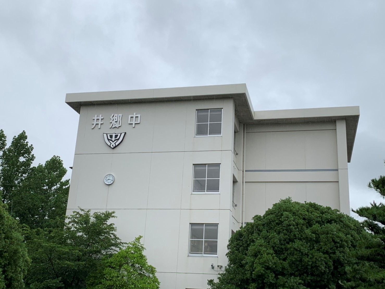 井郷中学校の校舎